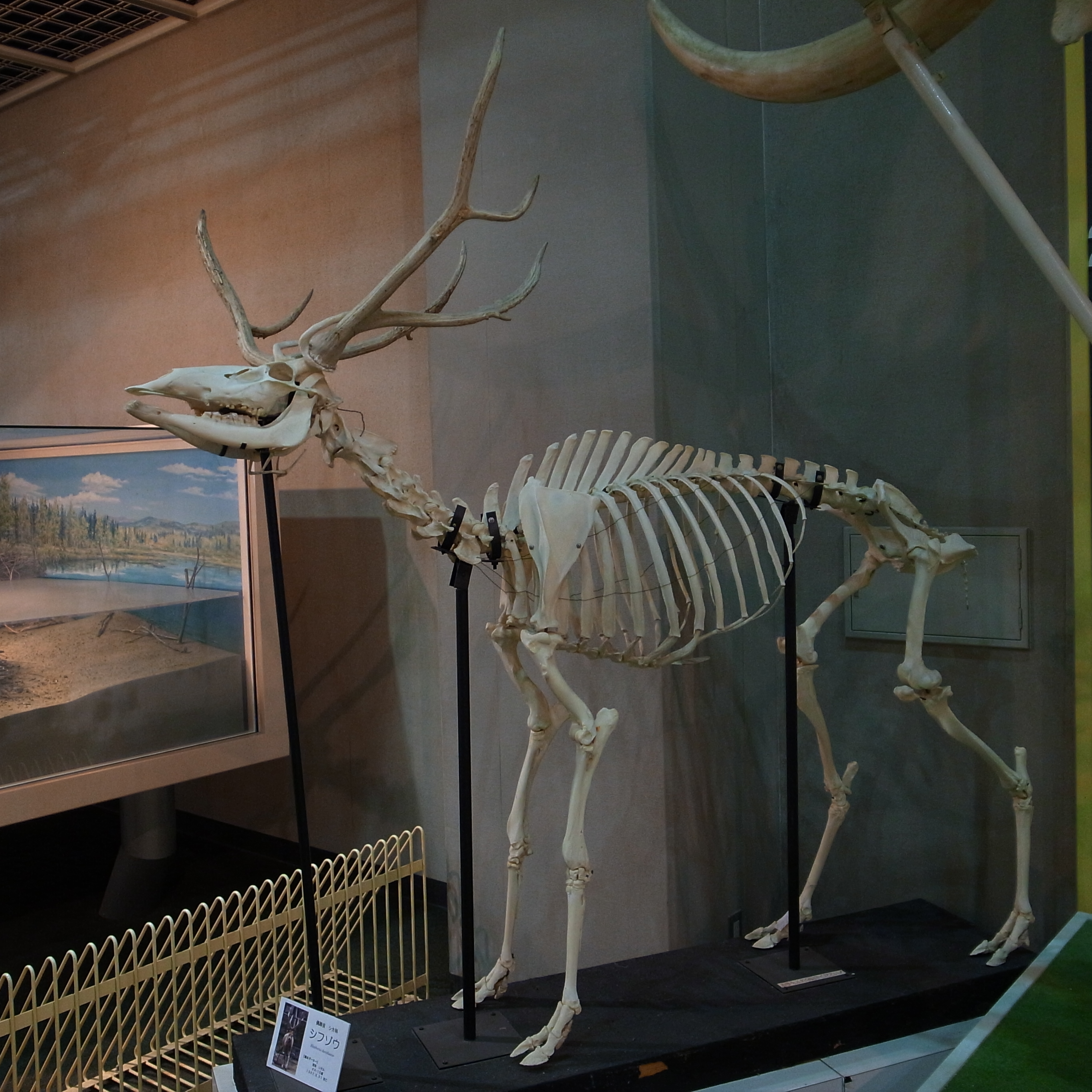 シフゾウ Père David's deer Domain: Eukaryota • Regnum: Animalia • Phylum: Chordata • Subphylum: Vertebrata • Infraphylum: Gnathostomata • Superclassis: Tetrapoda • Classis: Mammalia • Ordo: Artiodactyla • Familia: Cervidae • Genus: Elaphurus Wikispecies has an entry on: Elaphurus davidianus. Species Elaphurus davidianus Milne-Edwards, 1866 動物界 脊索動物門 哺乳綱 ウシ目 シカ科 シフゾウ属 Location: Kobe Oji Zoo, Jaoan Other photos: NCBI Taxonomy ID:43332 ITIS link: Elaphurus davidianus Milne-Edwards, 1866 EOL link: Elaphurus davidianus uBio search link: Elaphurus davidianus